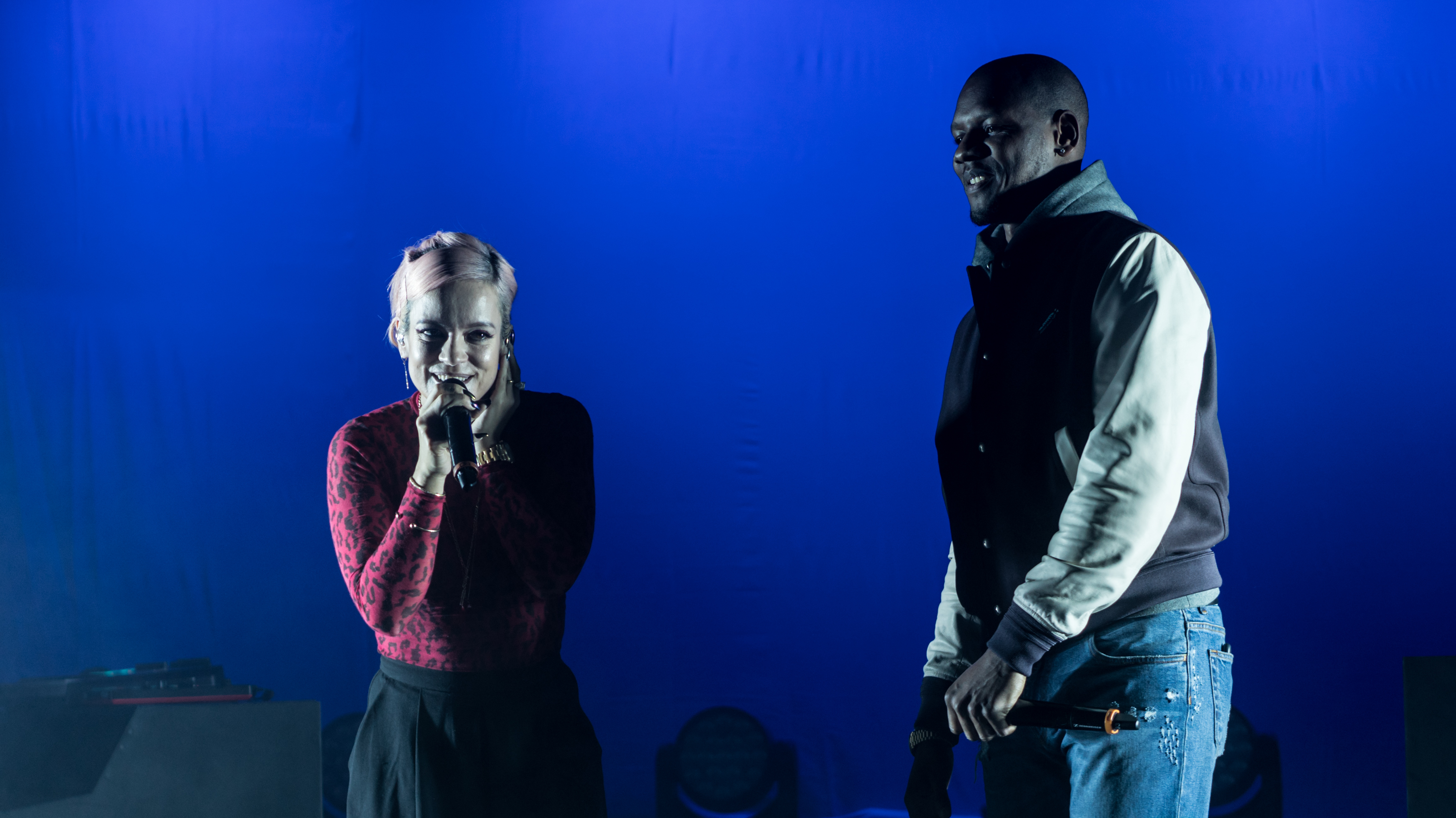 LilyTufnell210318-25